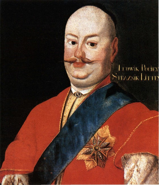 Беларуская (тарашкевіца): Партрэт Людвіка Пацея (Ludvik Paciej) (1726—1771)